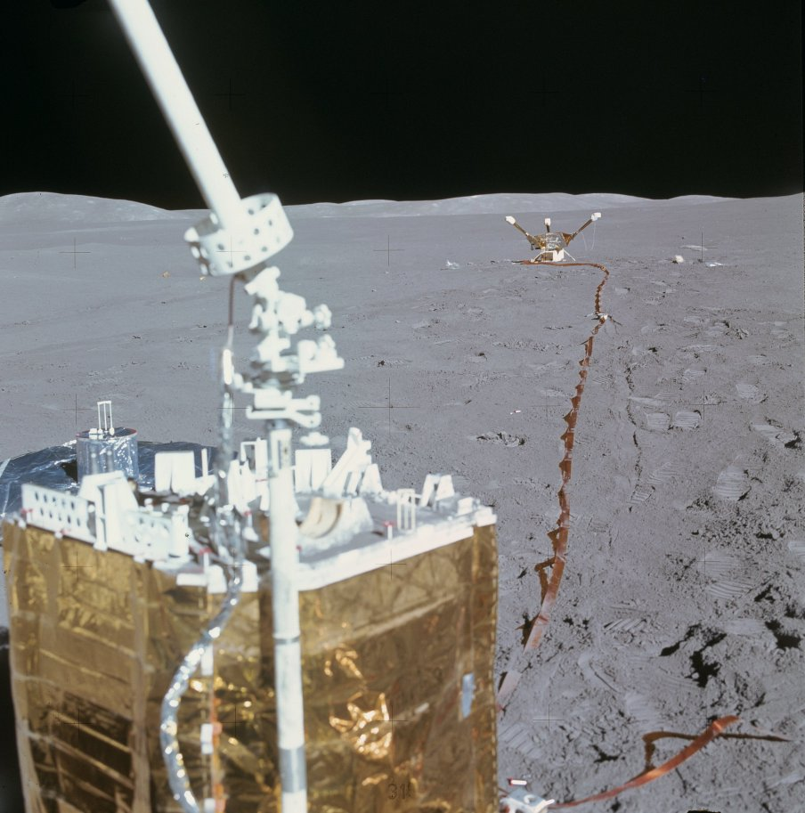 Apollo 15 ALSEP Central Station in the foreground and Lunar Surface Magnetometer Центральная станция комплекта научных приборов ALSEP "Аполлона-15" на переднем плане и магнетометр - на заднем.